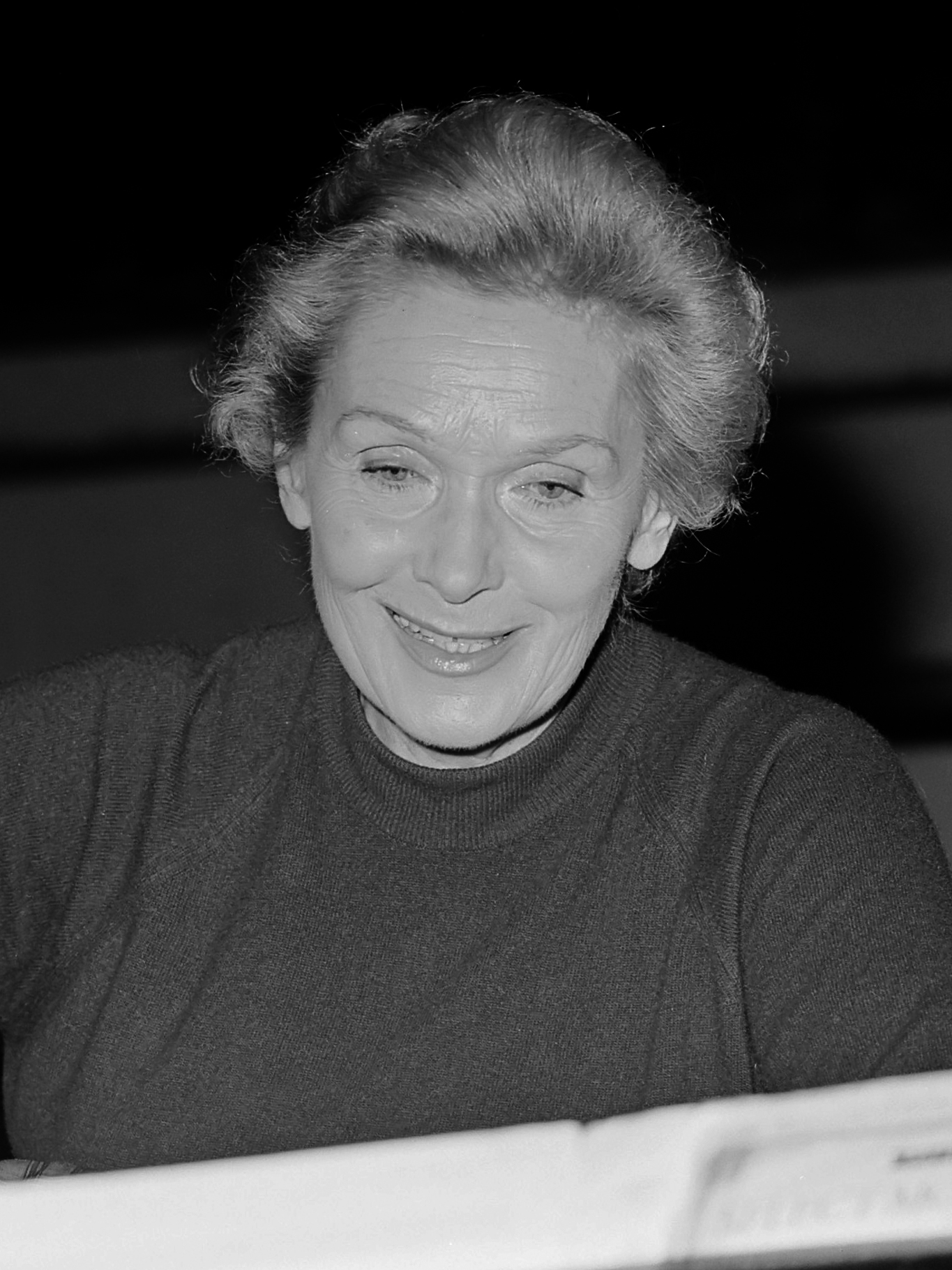 Elizabeth Schwartzkopff in Concertgebouw, Amsterdam 8 februari 1977